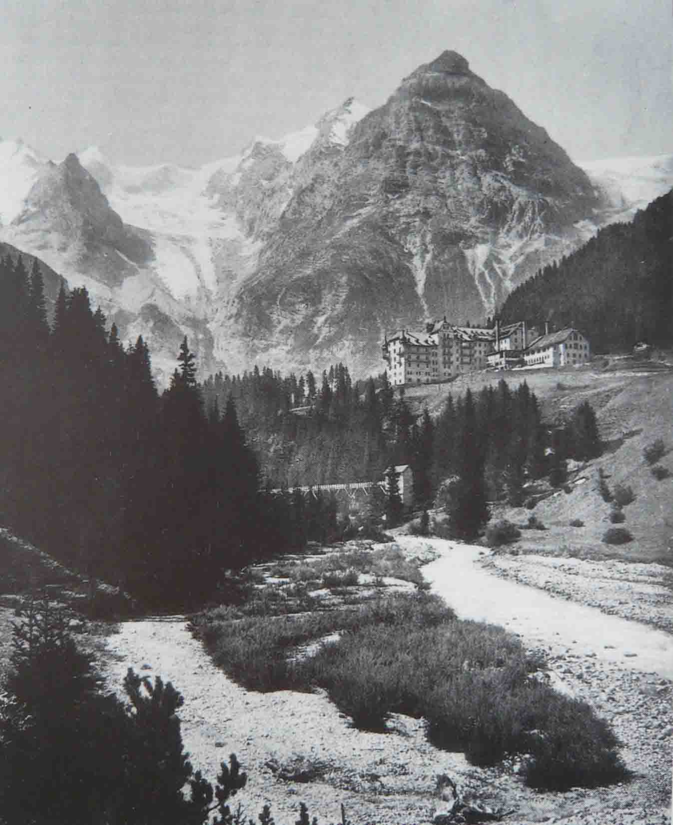 Grandhotel Trafoi, Stilfs, 1908